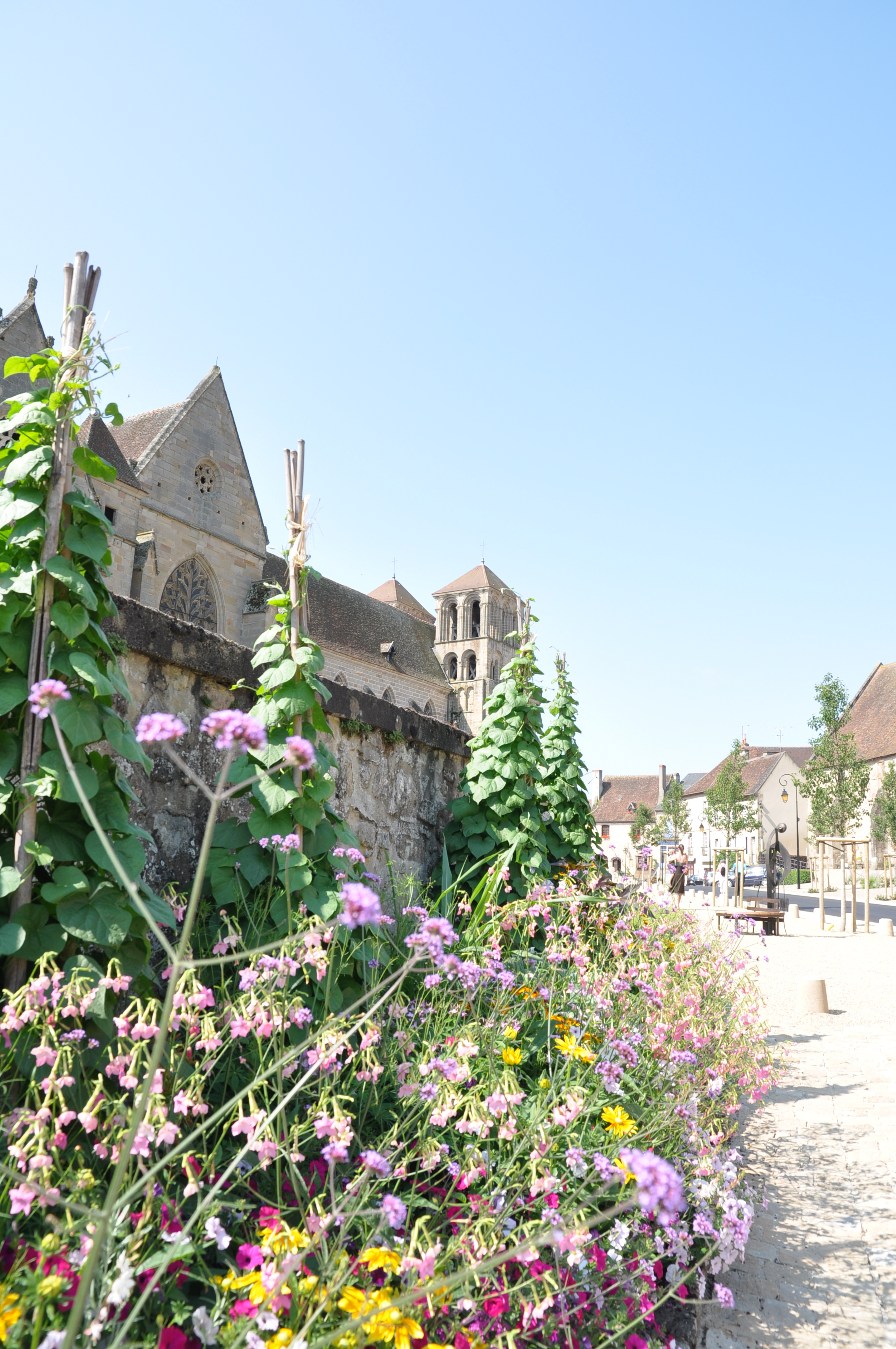 Extérieur en fleurs